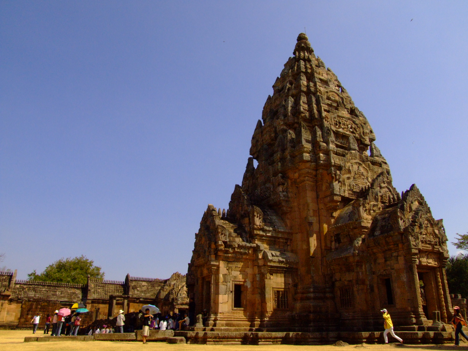 ปราสาทพนมรุ้ง